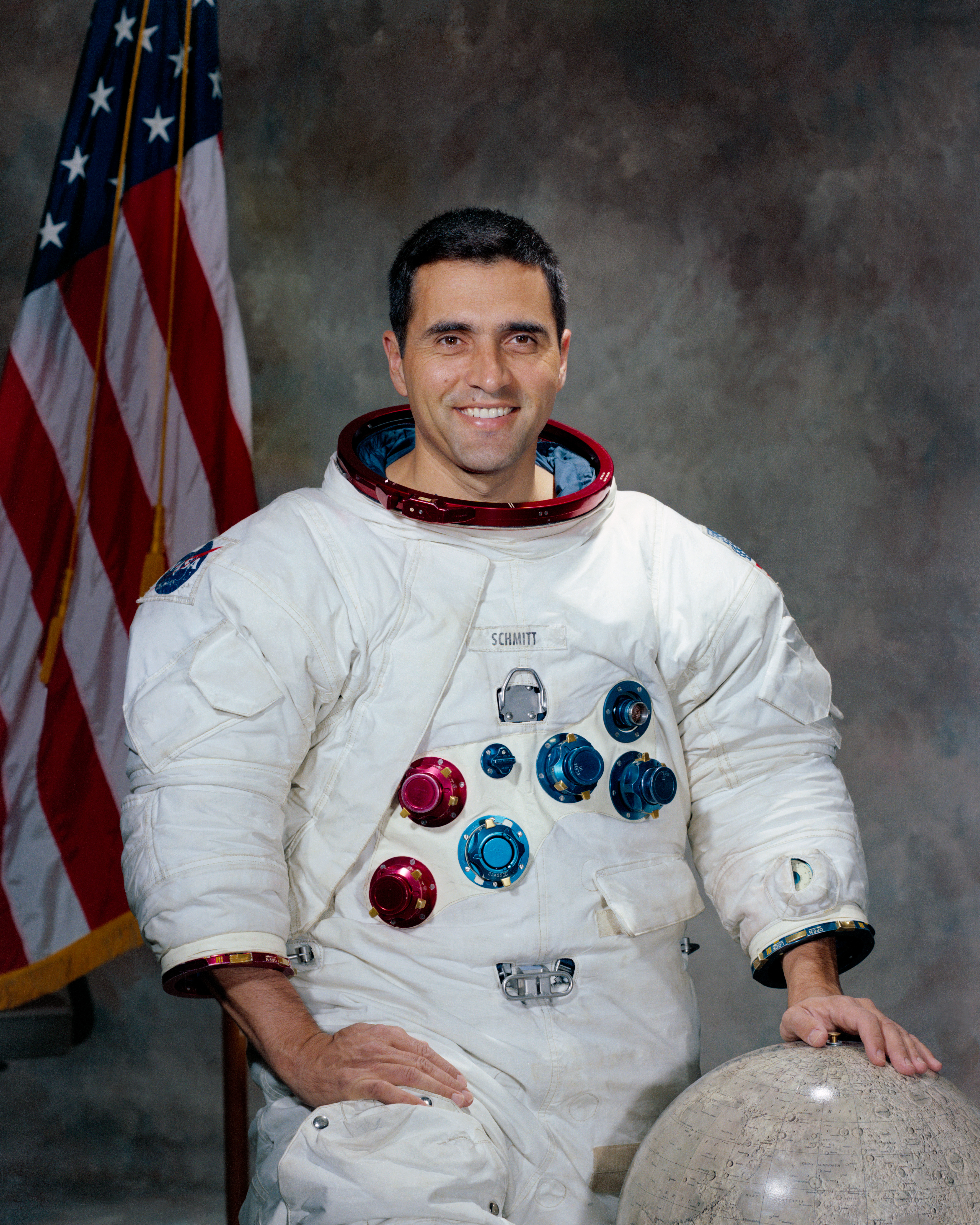 Harrison H. Schmitt astronaut